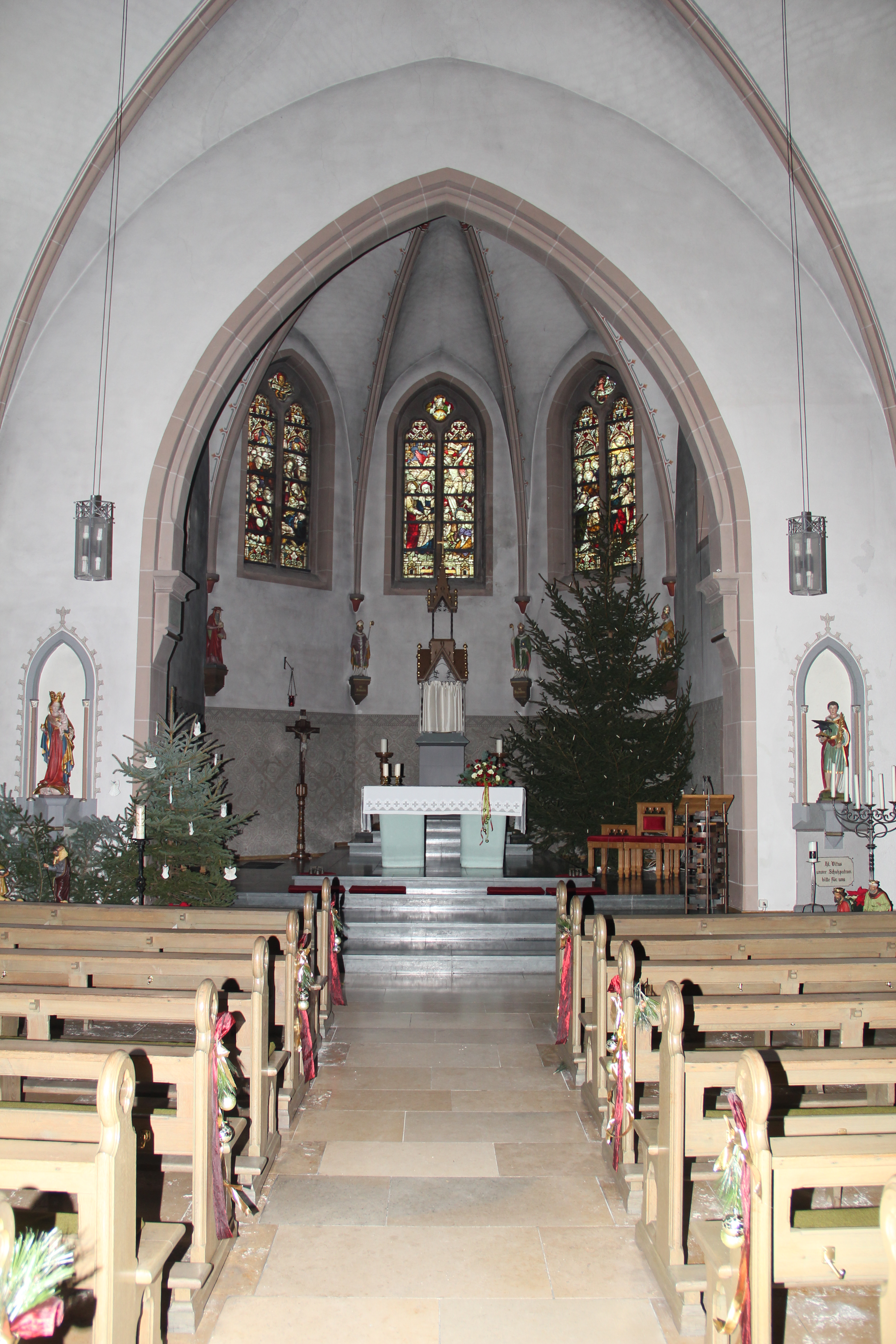 Innenansicht der Sankt-Vitus-Kirche in Alhausen